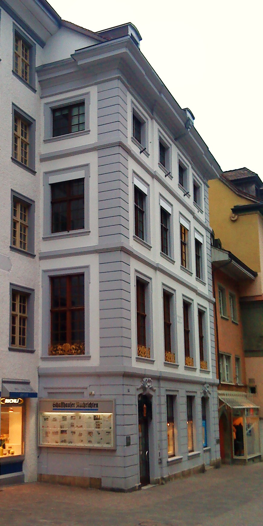 Die Kaufleutstube an der Vordergasse 58 in Schaffhausen. Der Hauptsitz der "Schaffhauser Nachrichten".